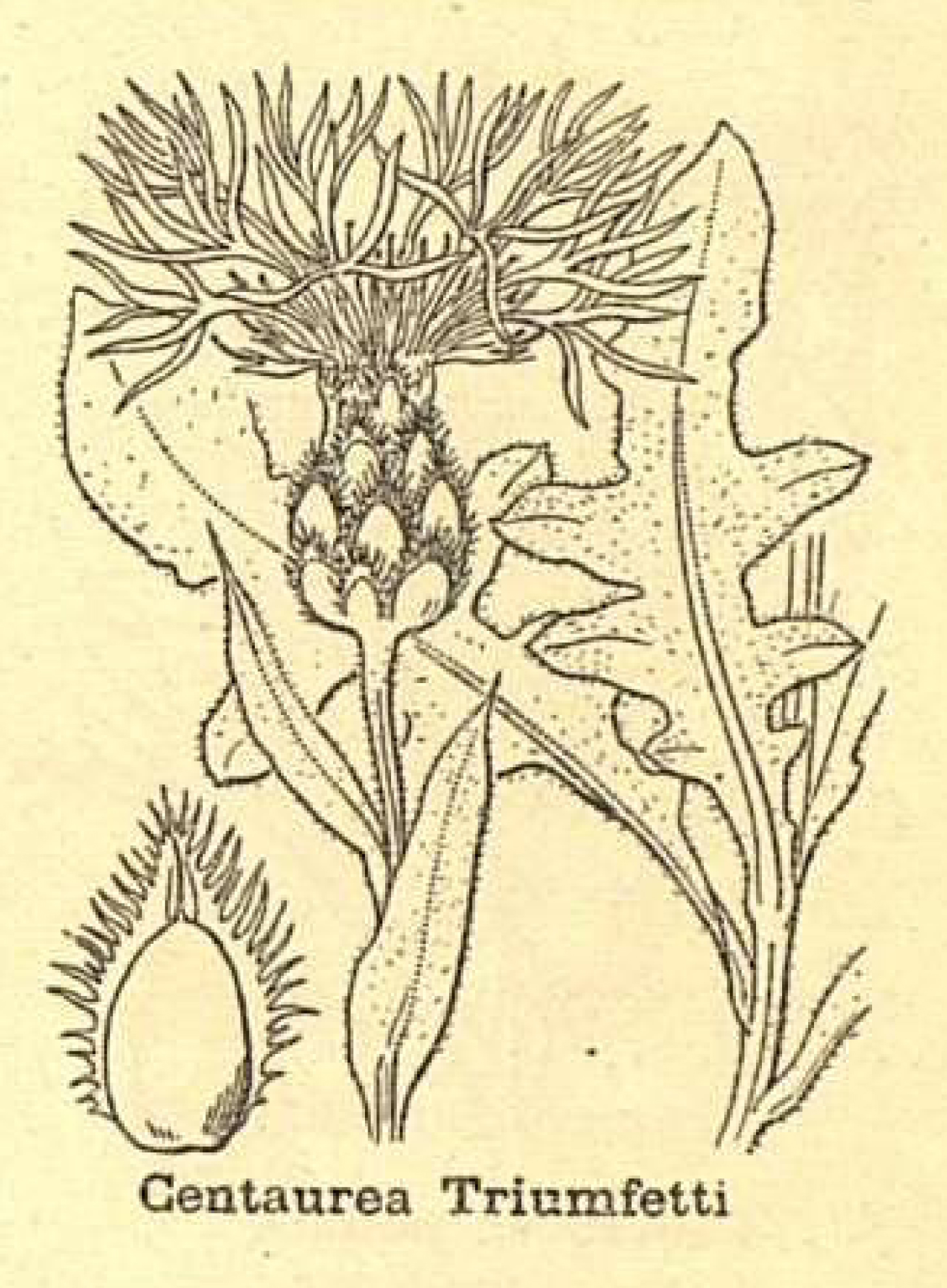 Legende: Hüllblatt. Oberer Teil der Pflanze. Unterer Teil der Pflanze.